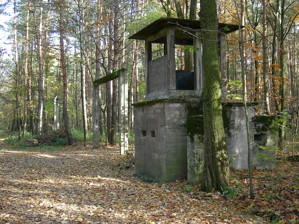 Entrée du camp Judenlager Blechhammer, l'entrée principale était un peu plus loin sur la droite. Le camp des SS était situé en face de la porte.